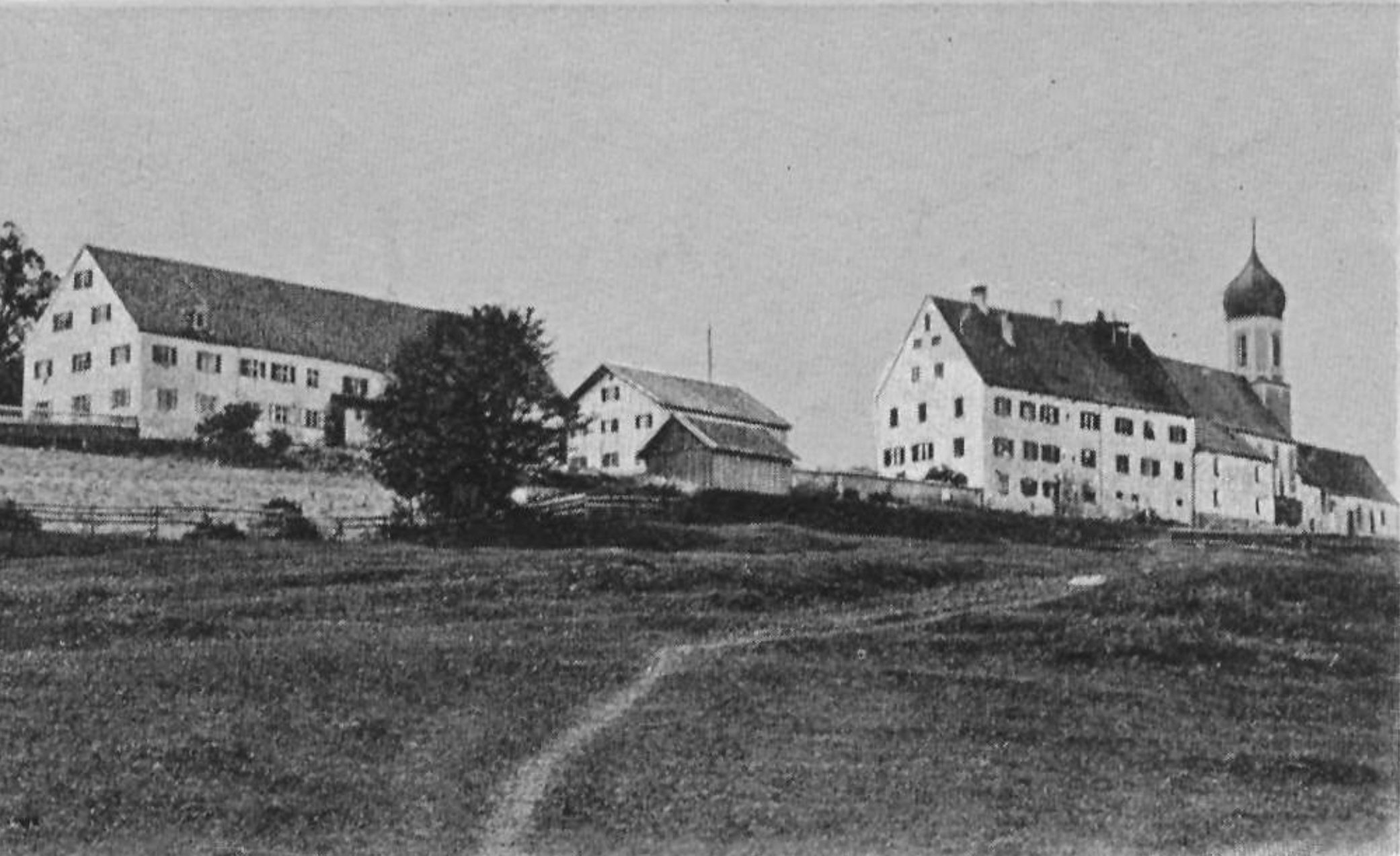 Wetterstation Hohenpeißenberg